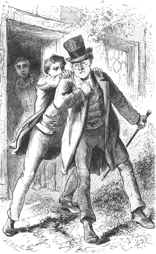 Illustration de J. Gerlier pour la Fortune de Gaspard, Paris, Hachette, 1876